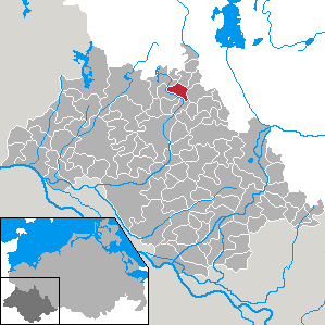 Warsow in Mecklenburg-Vorpommern - district Ludwigslust